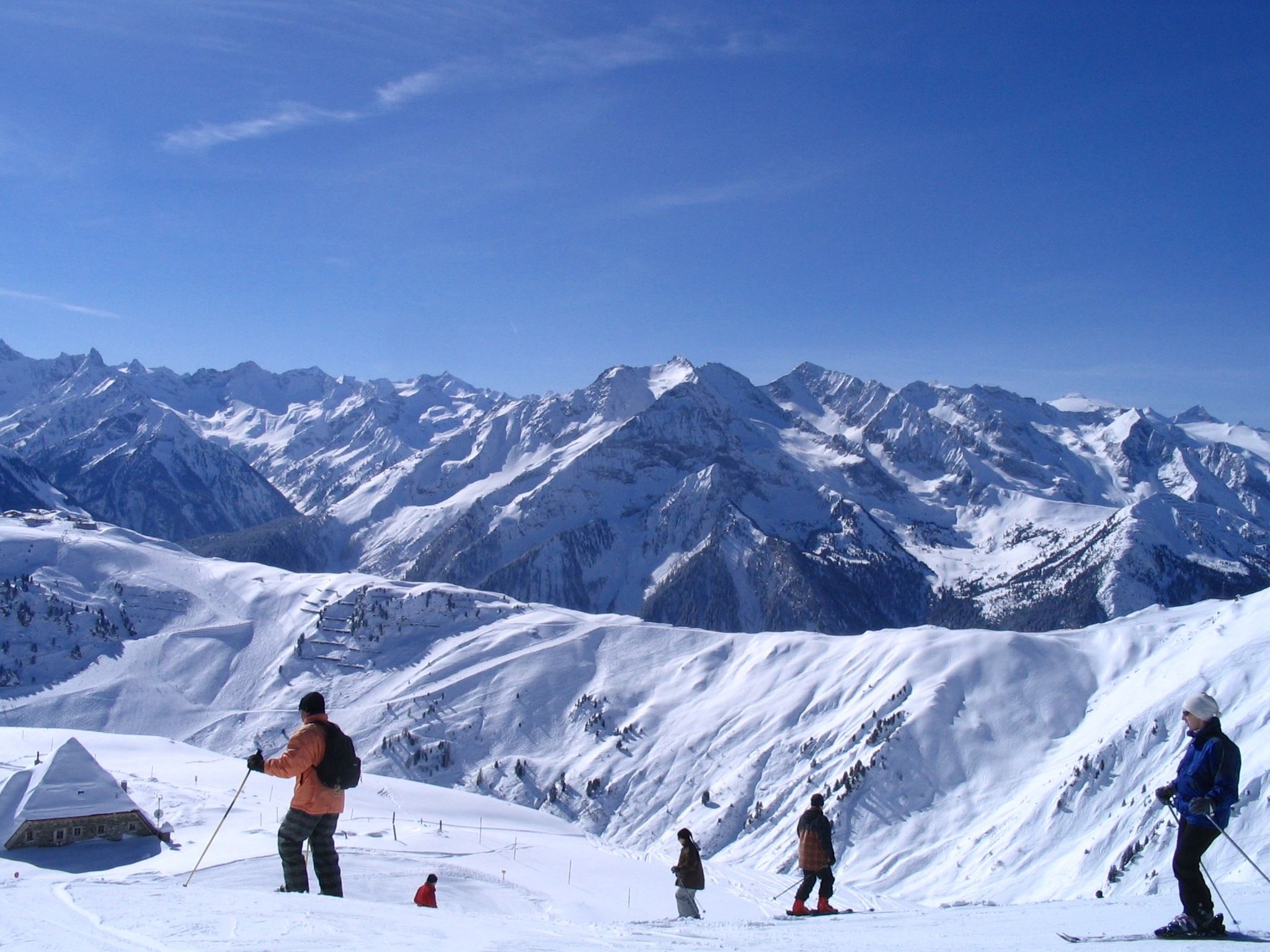 נוף מושלג באתר הסקי מאיירהופן